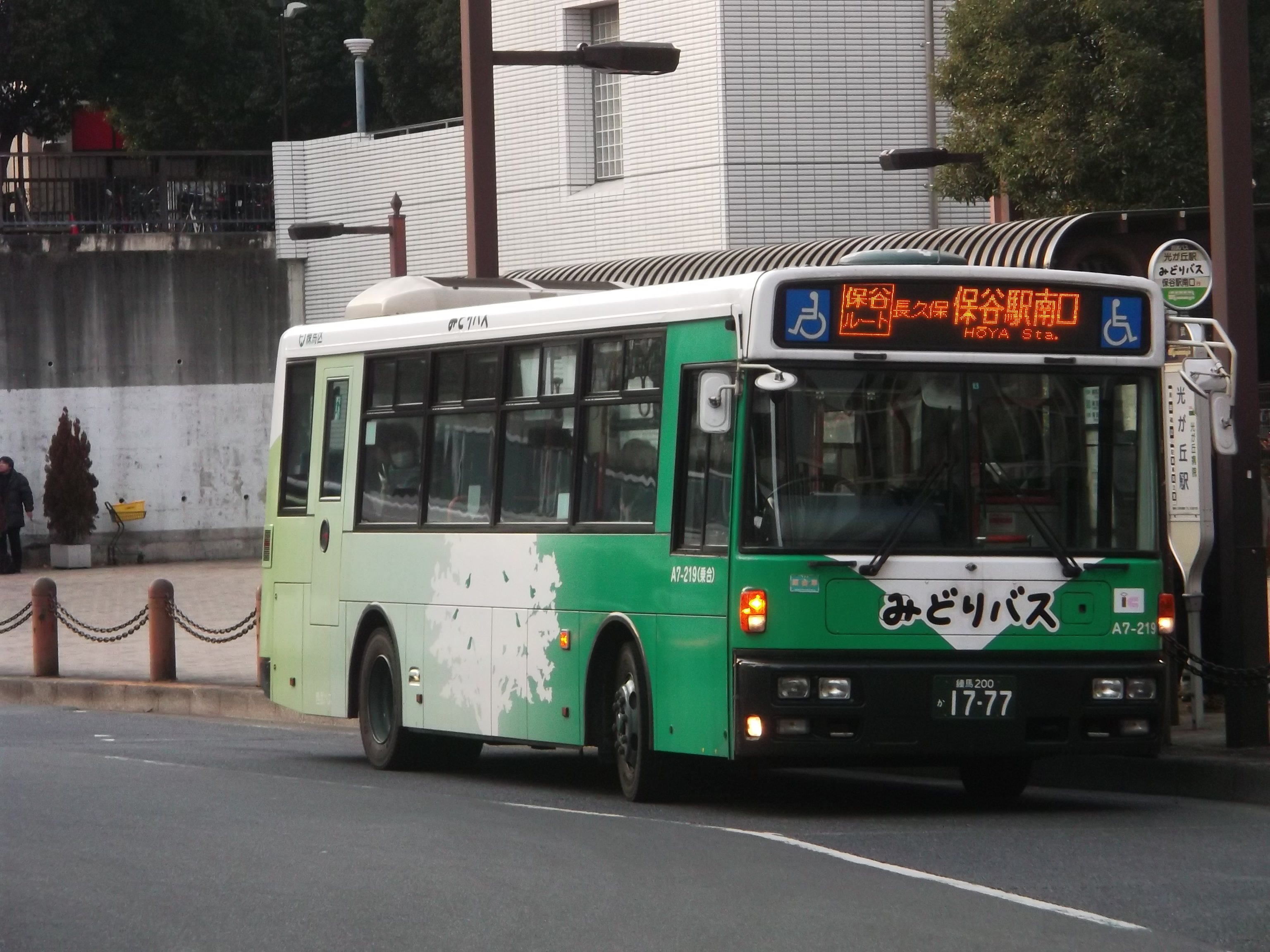 みどりバス保谷ルート（光が丘駅前にて）